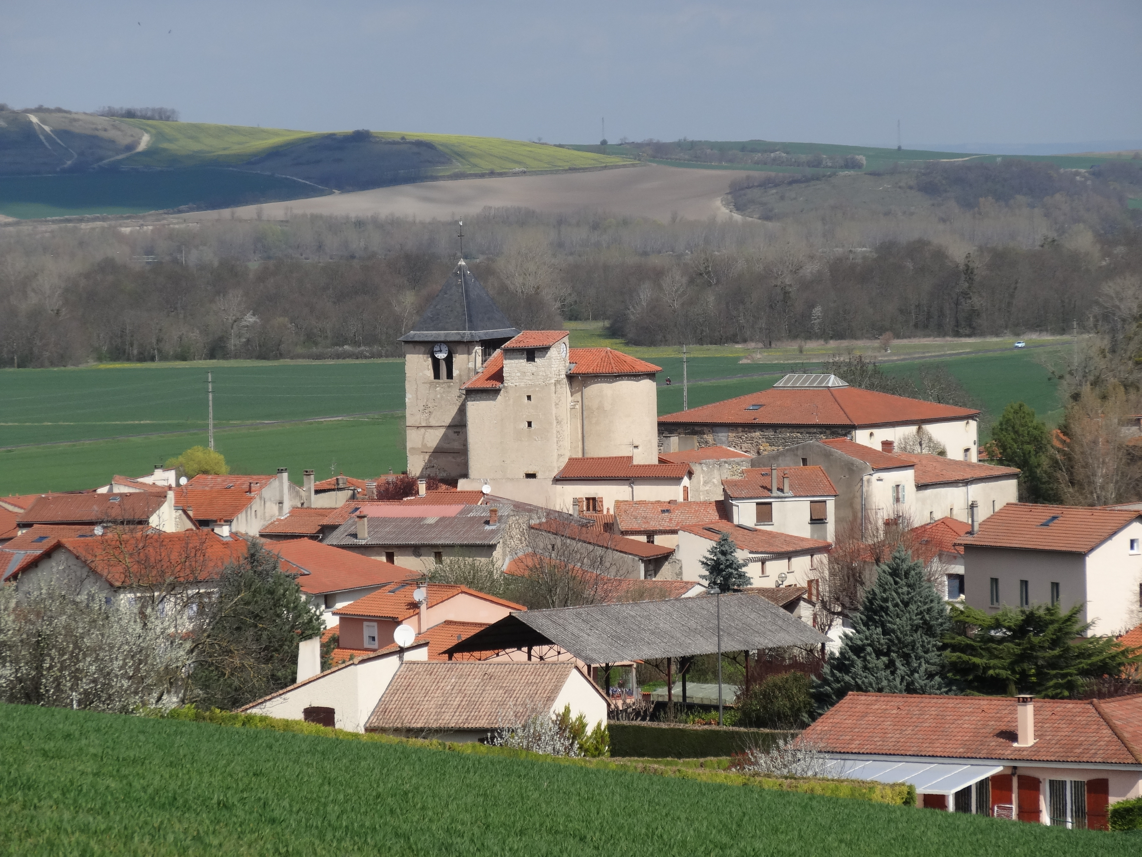 Pérignat-ès-Allier - Vue sur le centre